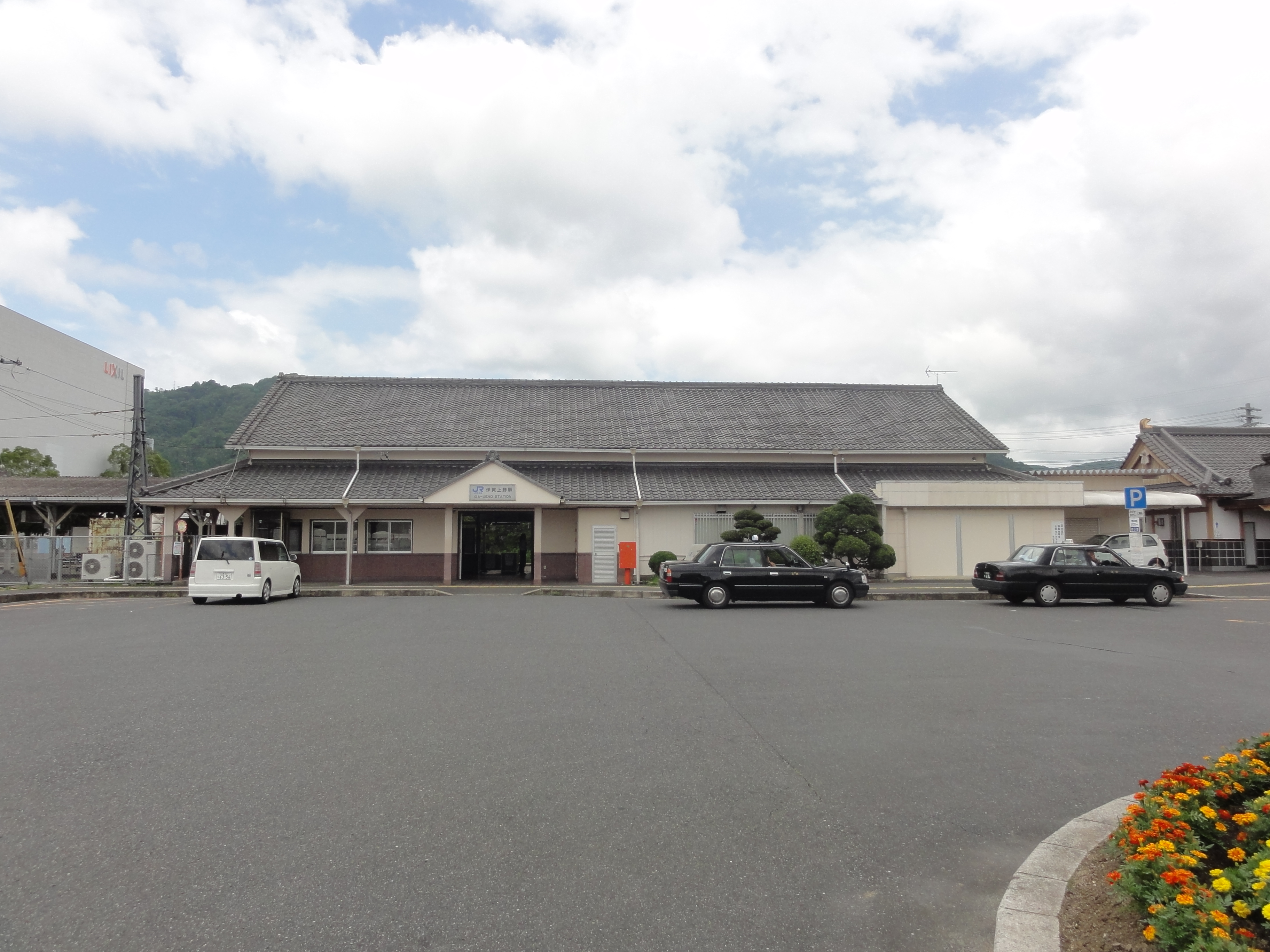 伊賀上野駅